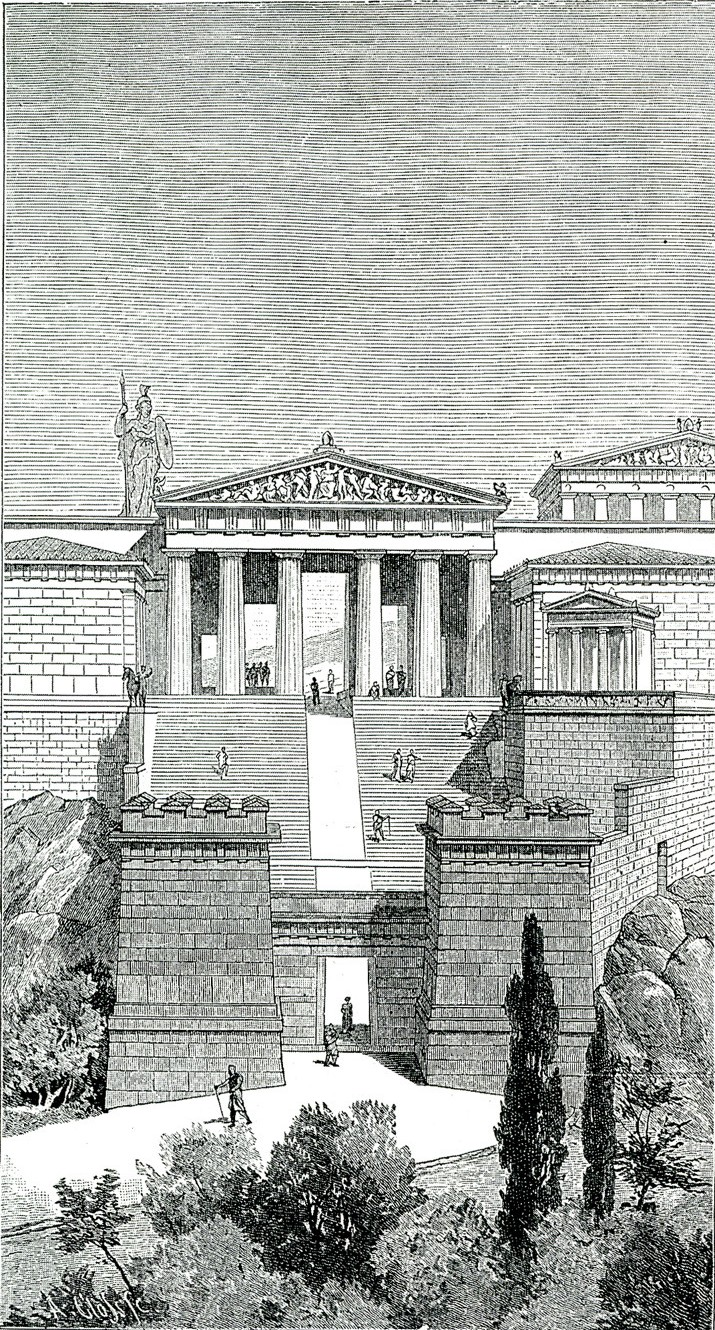 Ιάκωβος Φάλκε. Ελλάς, ο Βίος των Αρχαίων Ελλήνων. Κατά το γερμανικό του Ιακώβου Φάλκε, Ν. Γ. Πολίτης (μετ.), Αθήνα, Κάρολος Βίλμπεργκ, 1887